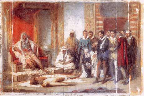 Reconhecimento do corpo do rei Dom Sebastião I de Portugal.